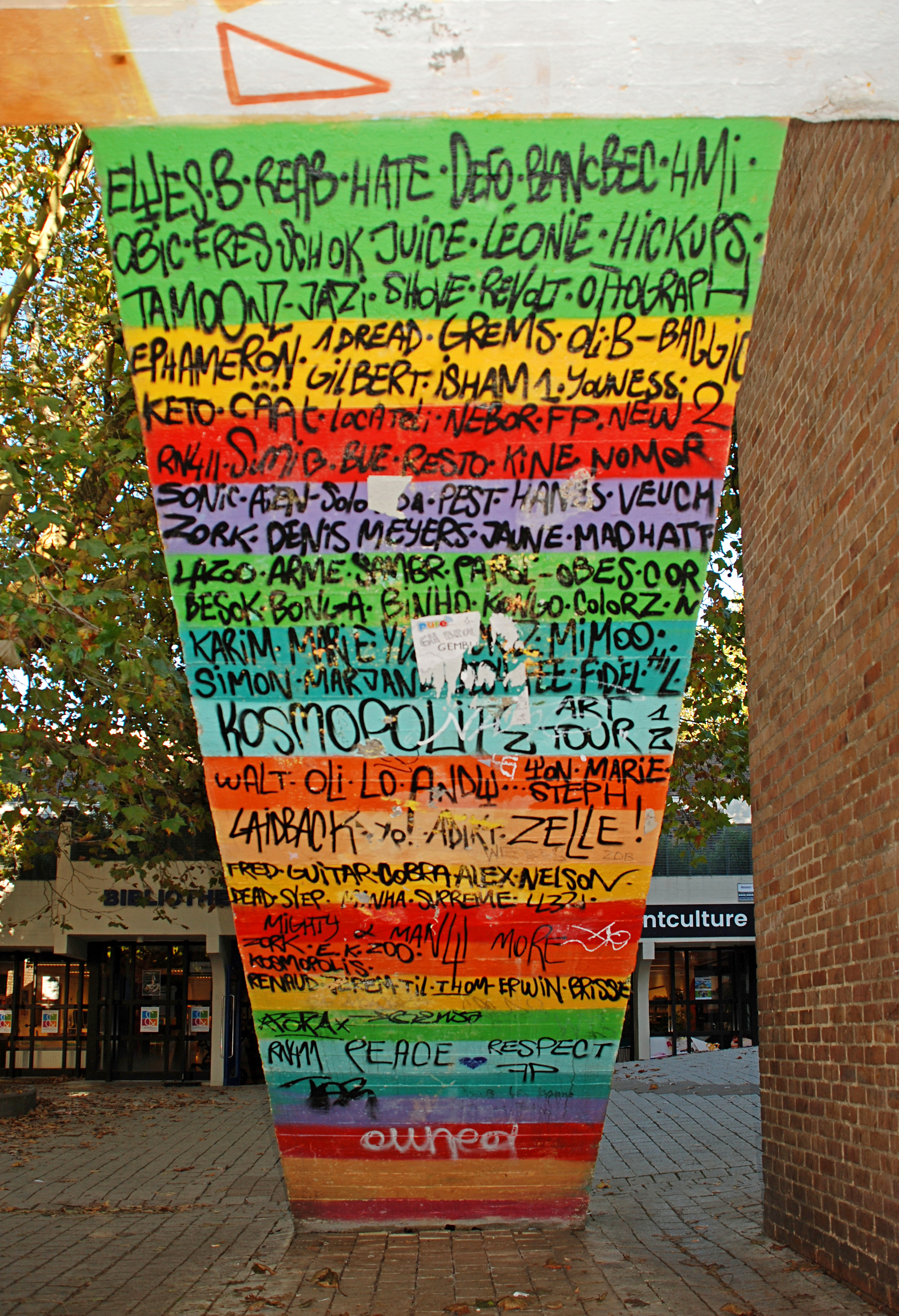 Belgique - Louvain-la-Neuve - Rue des Wallons - Passerelle